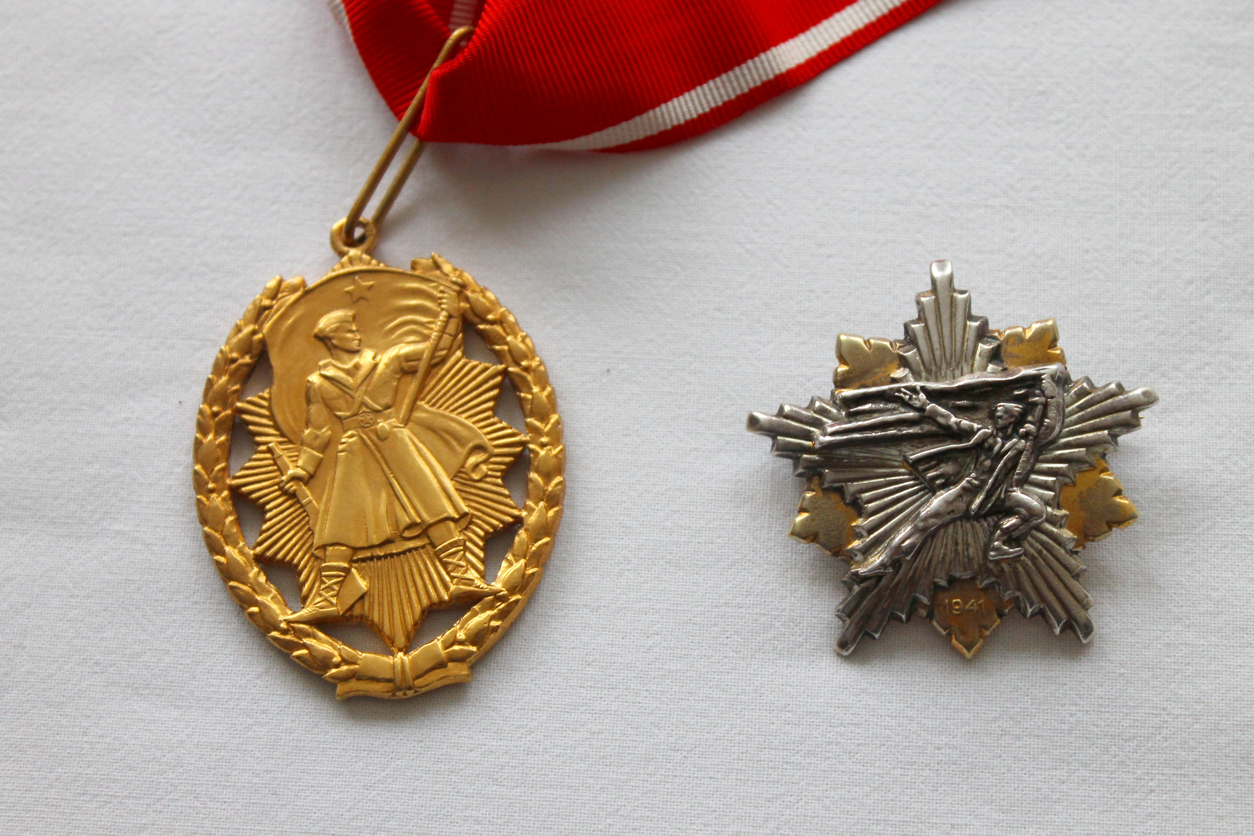 Орден народног хероја и Партизанска споменица 1941.